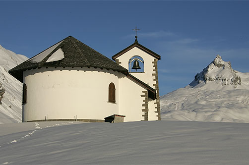 Melchsee-Frutt: Kapelle und Graustock